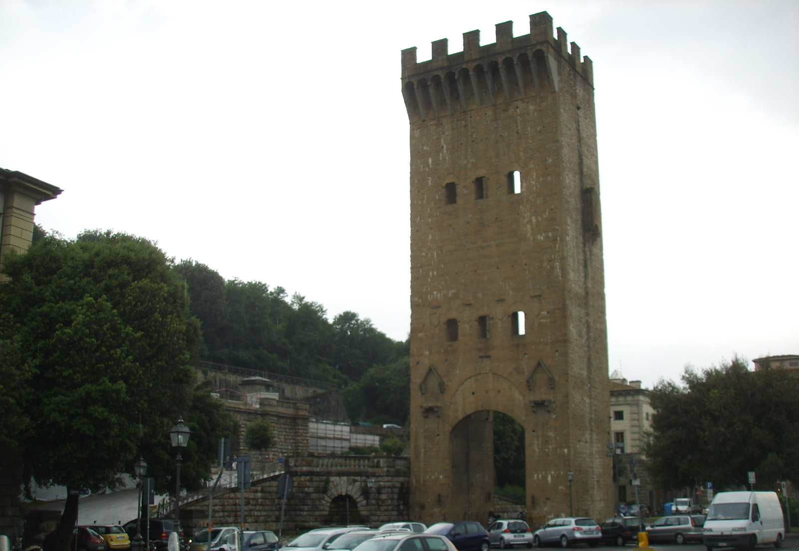 Porta San Niccolò a Firenze.